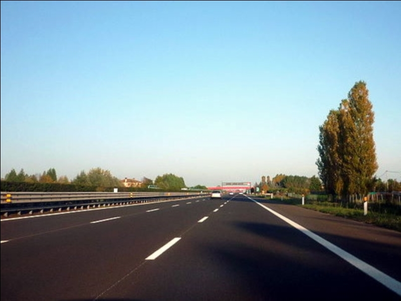 A57